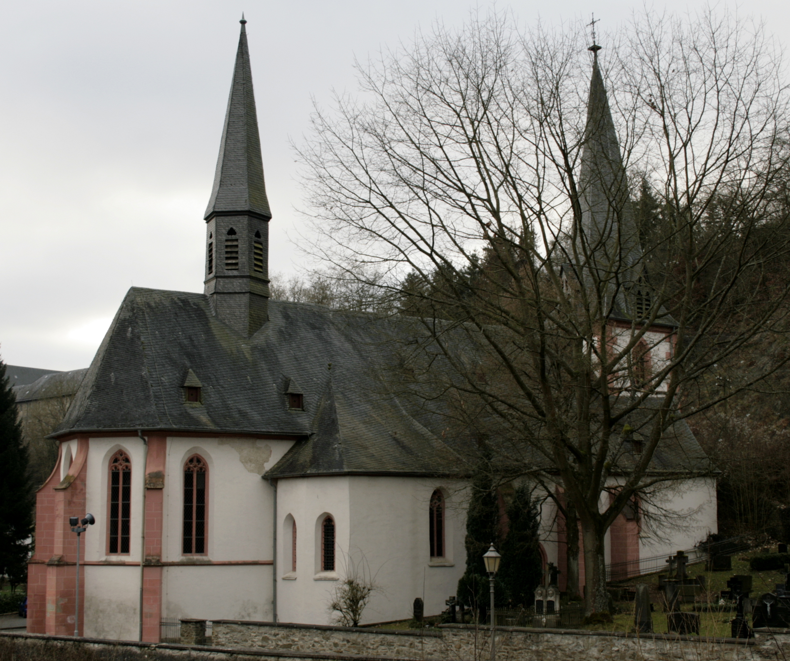 Rückseite (Nordostseite) der Liebfrauenkirche in Hadamar, Deutschland